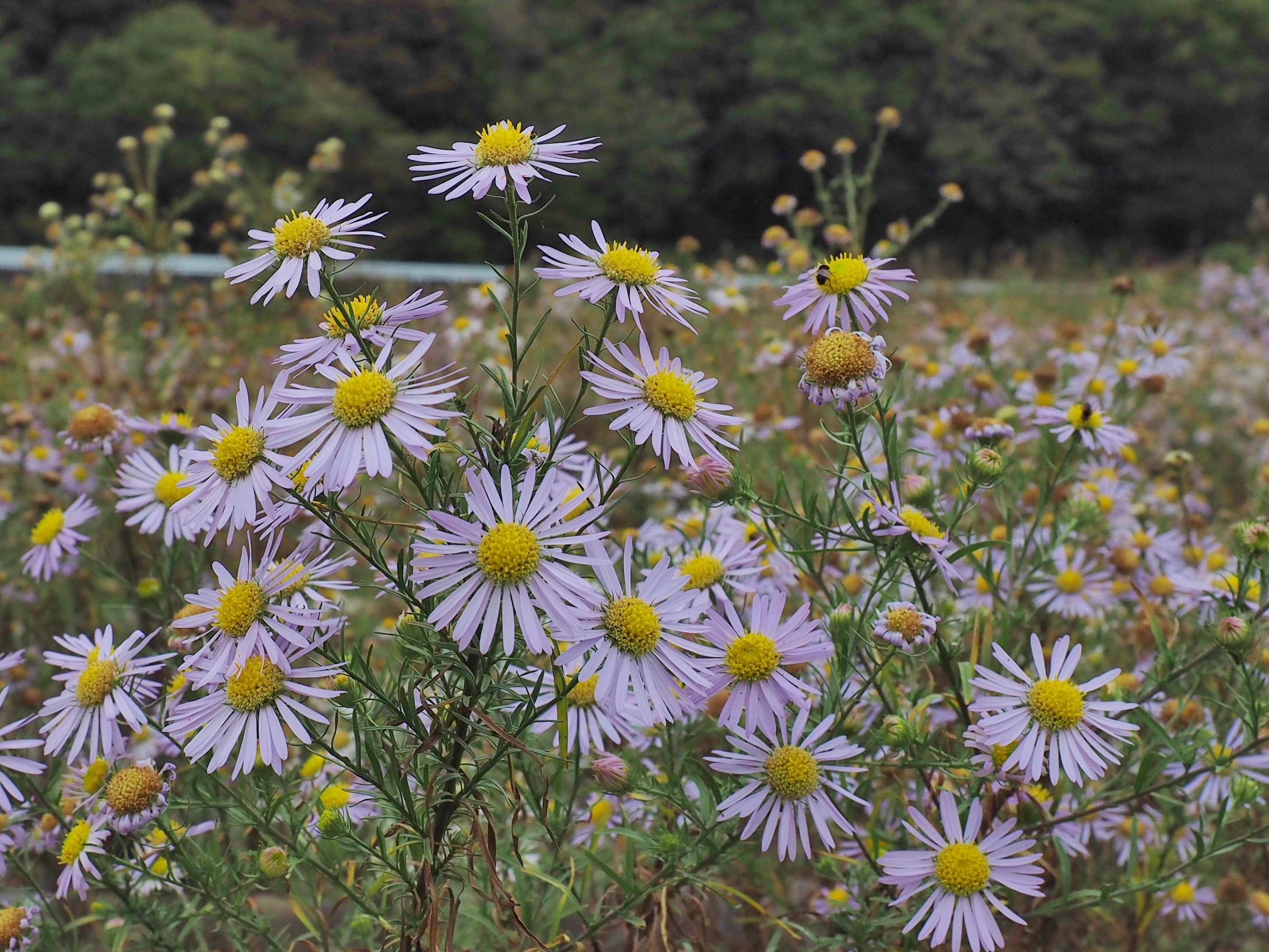 神奈川県愛川町